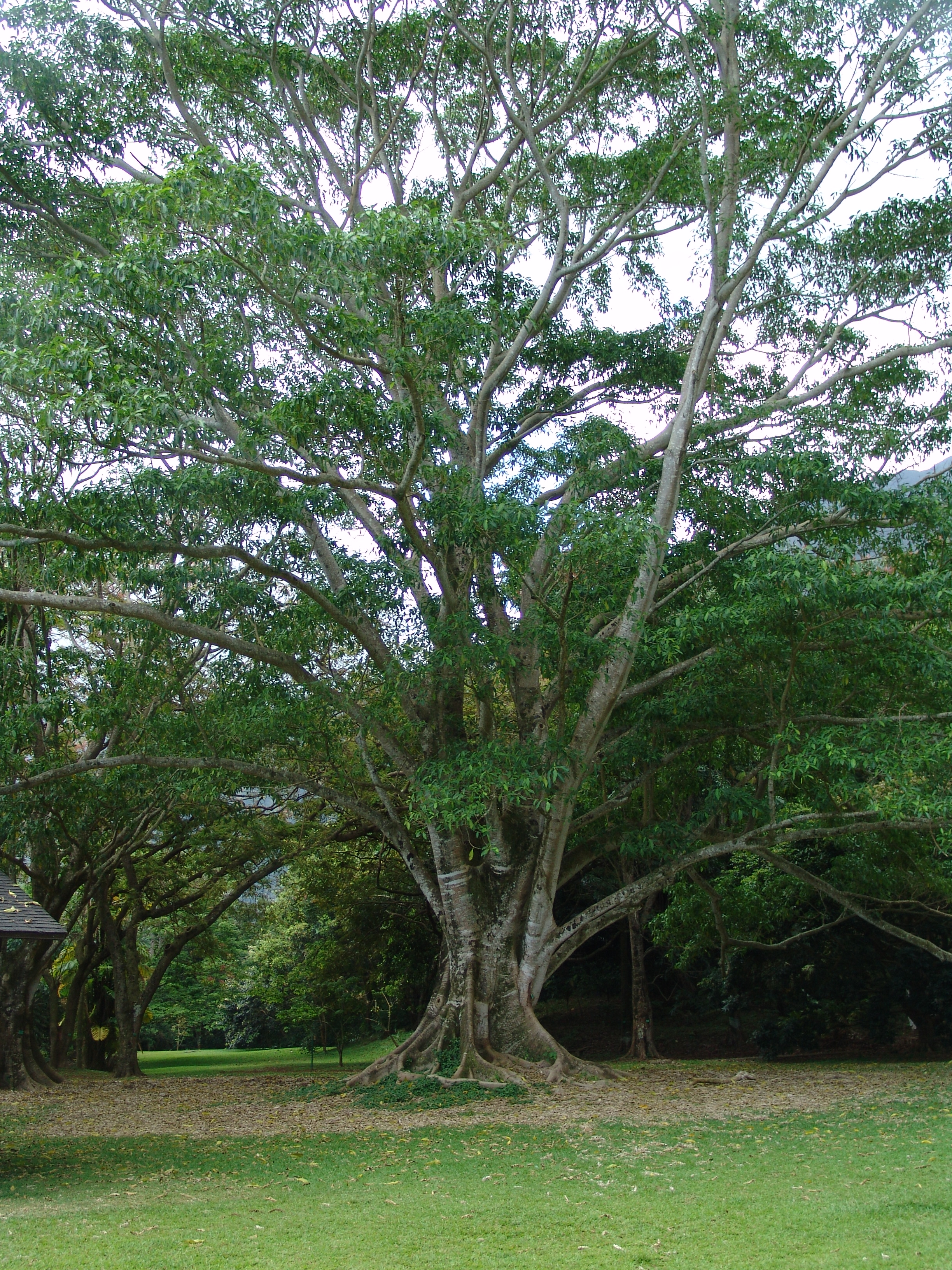 Pacay (Inga feuillei) in Ho'omaluhia Botanical Garden Oahu Hawaii